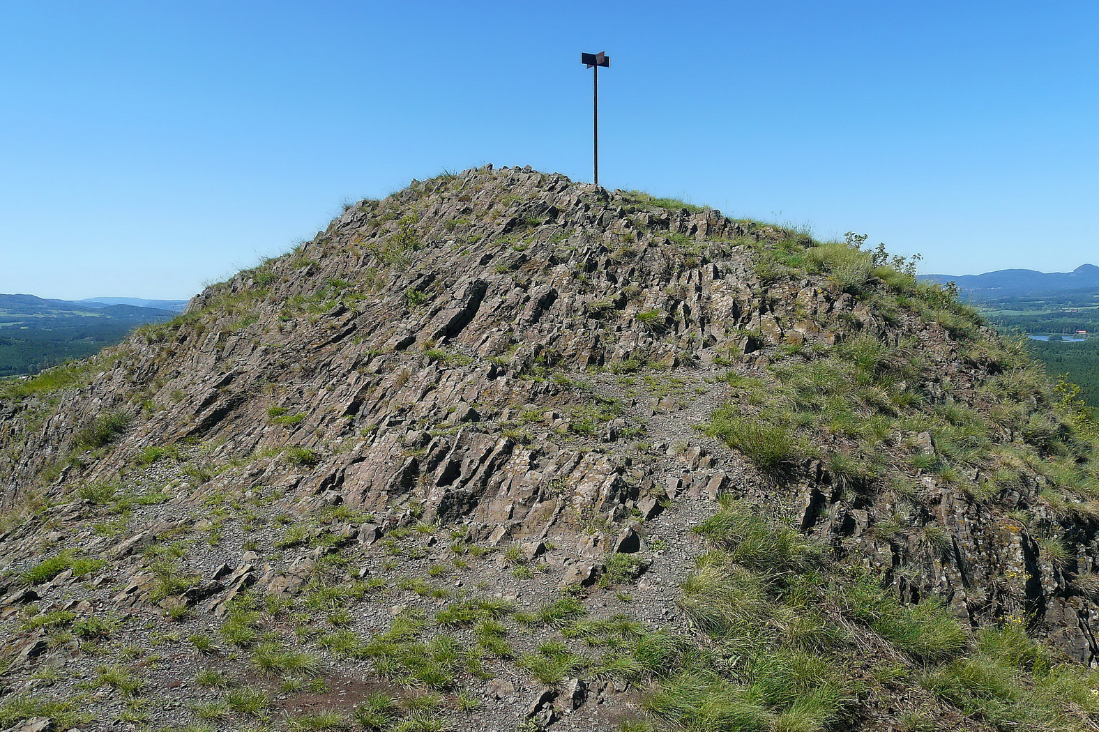 Vrchol Lysé skály